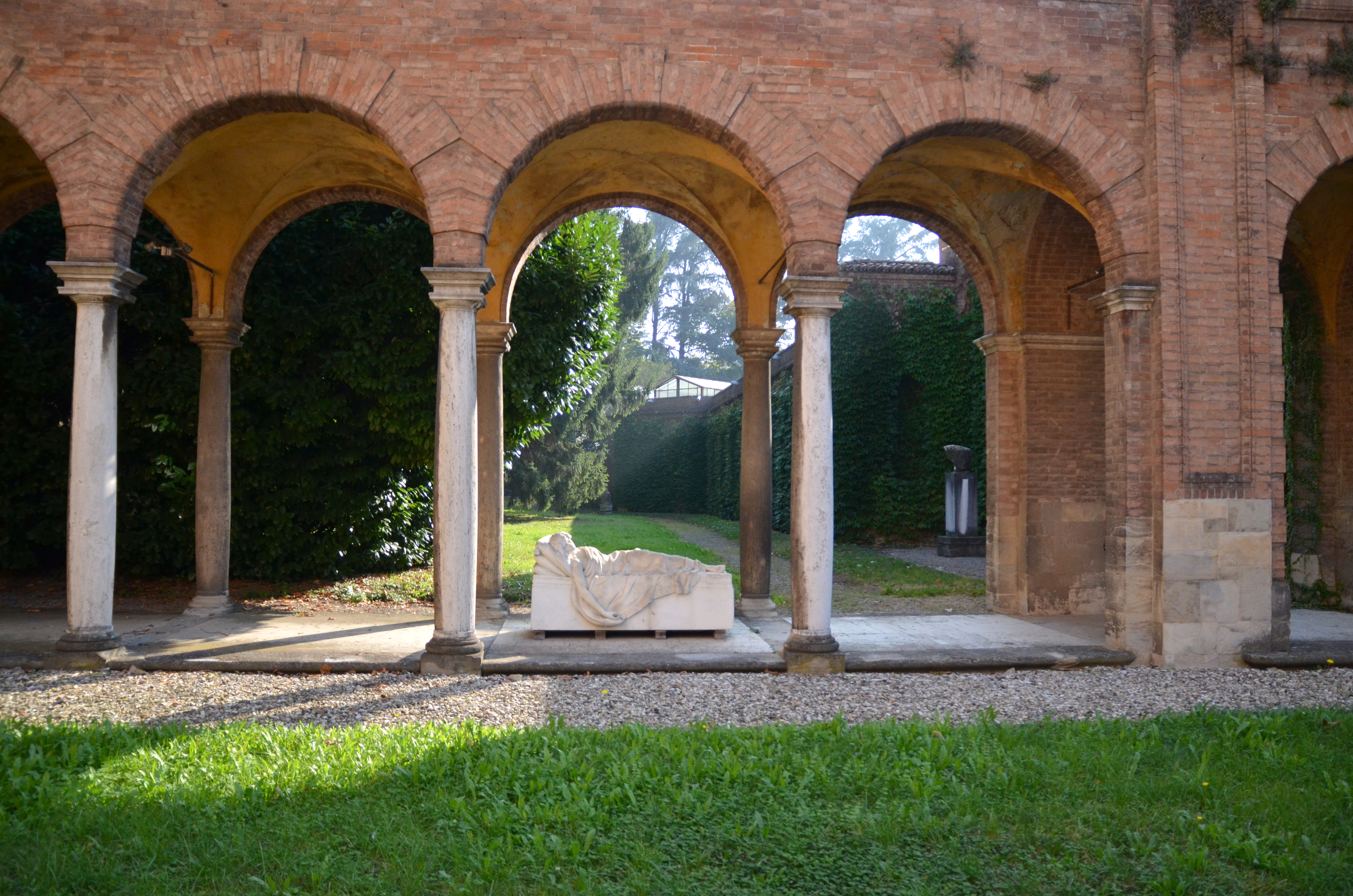 Edificio storico sede della Galleria Ricci Oddi This is a photo of a monument which is part of cultural heritage of Italy.